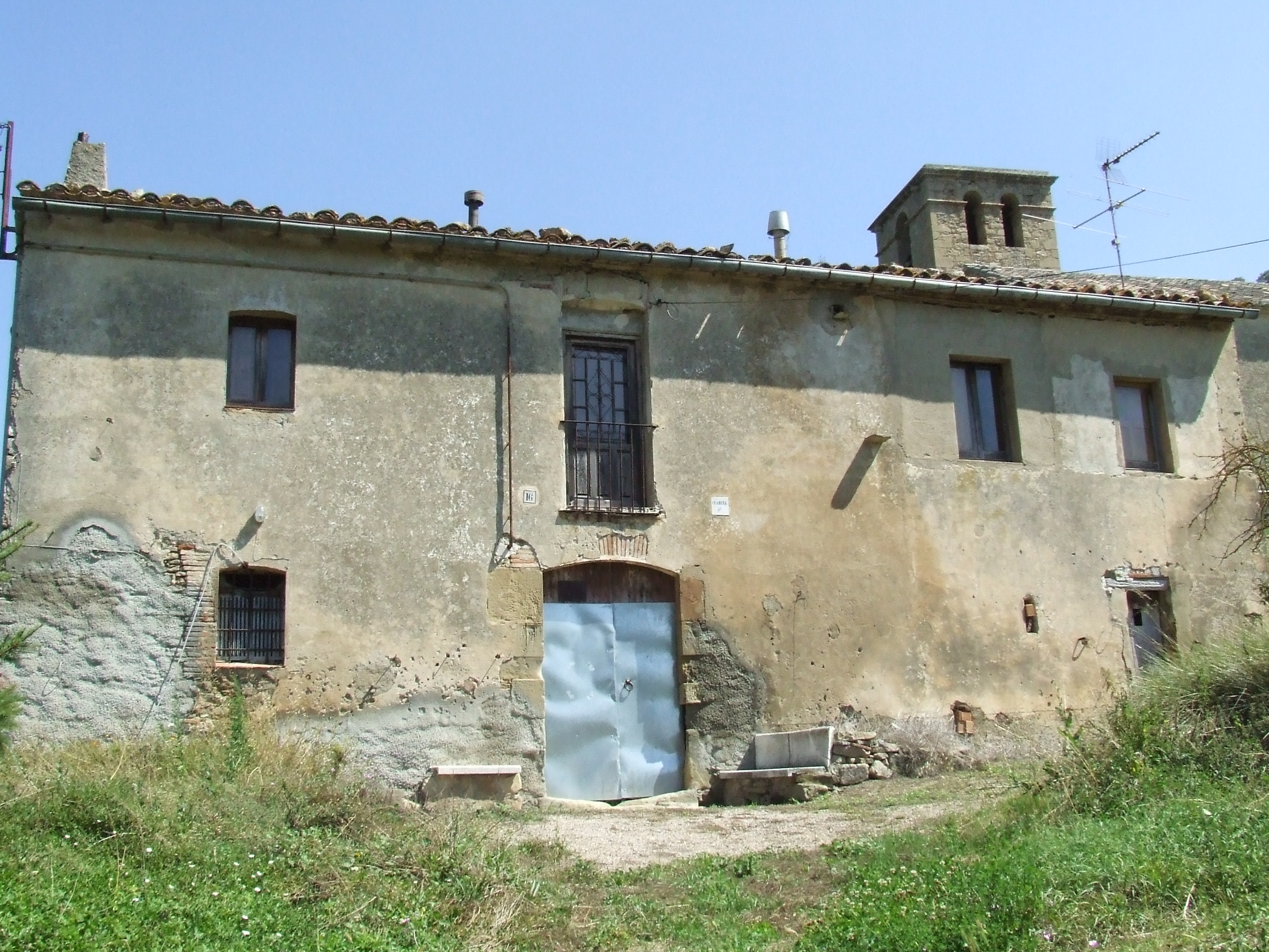 Cal Tomàs (Castellcir, Moianès)